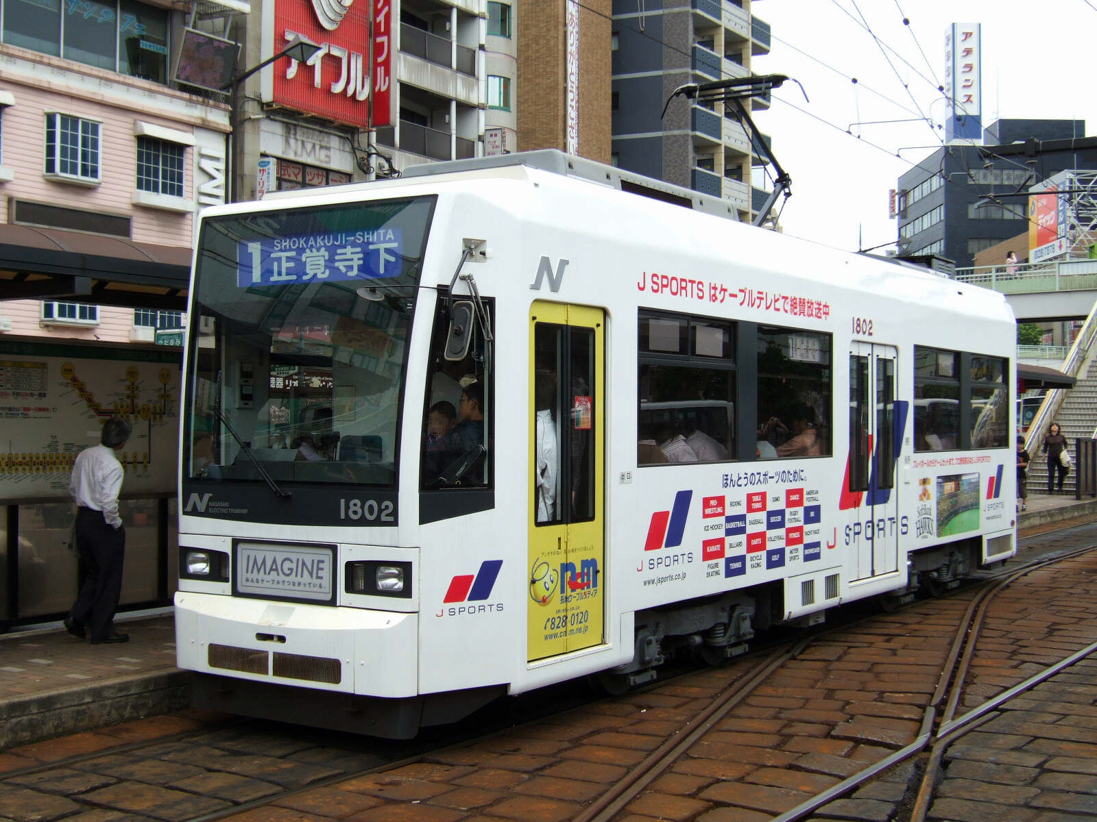 長崎電気軌道1800形1802号車（長崎駅前電停にて）